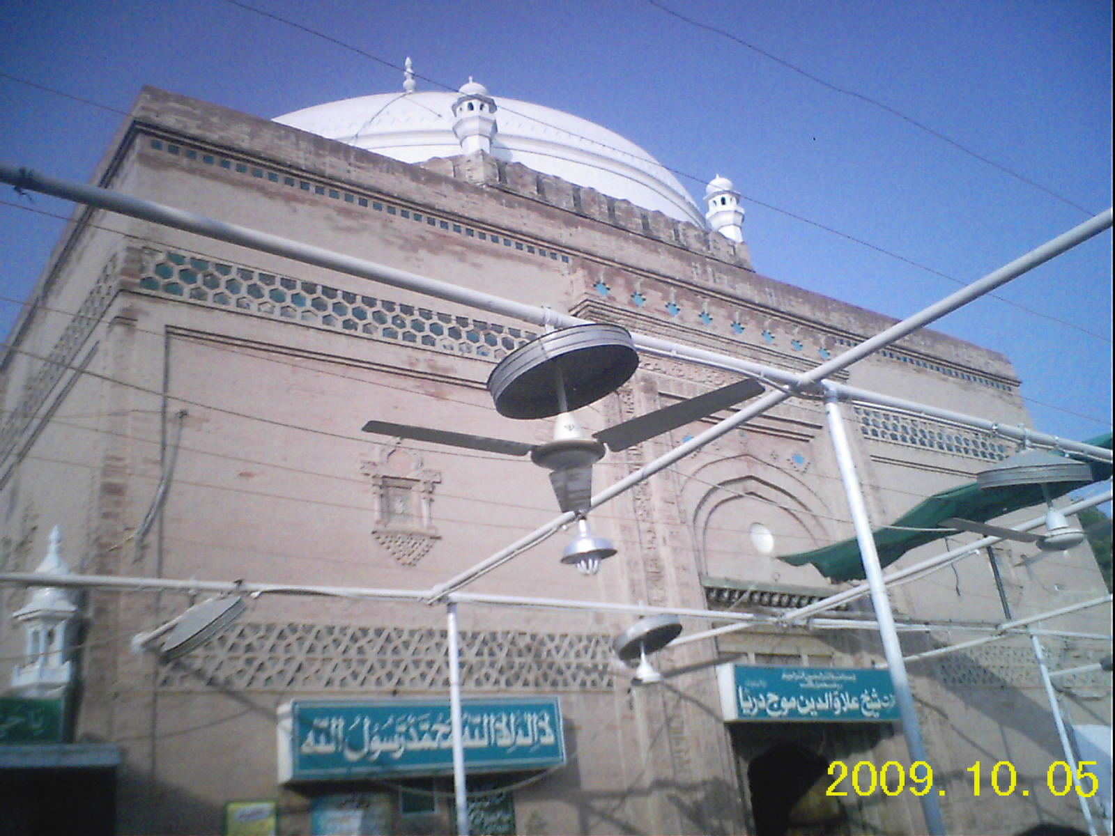 Shrine of Shaikh Ala ud deen mauj darya at Pak Pattan